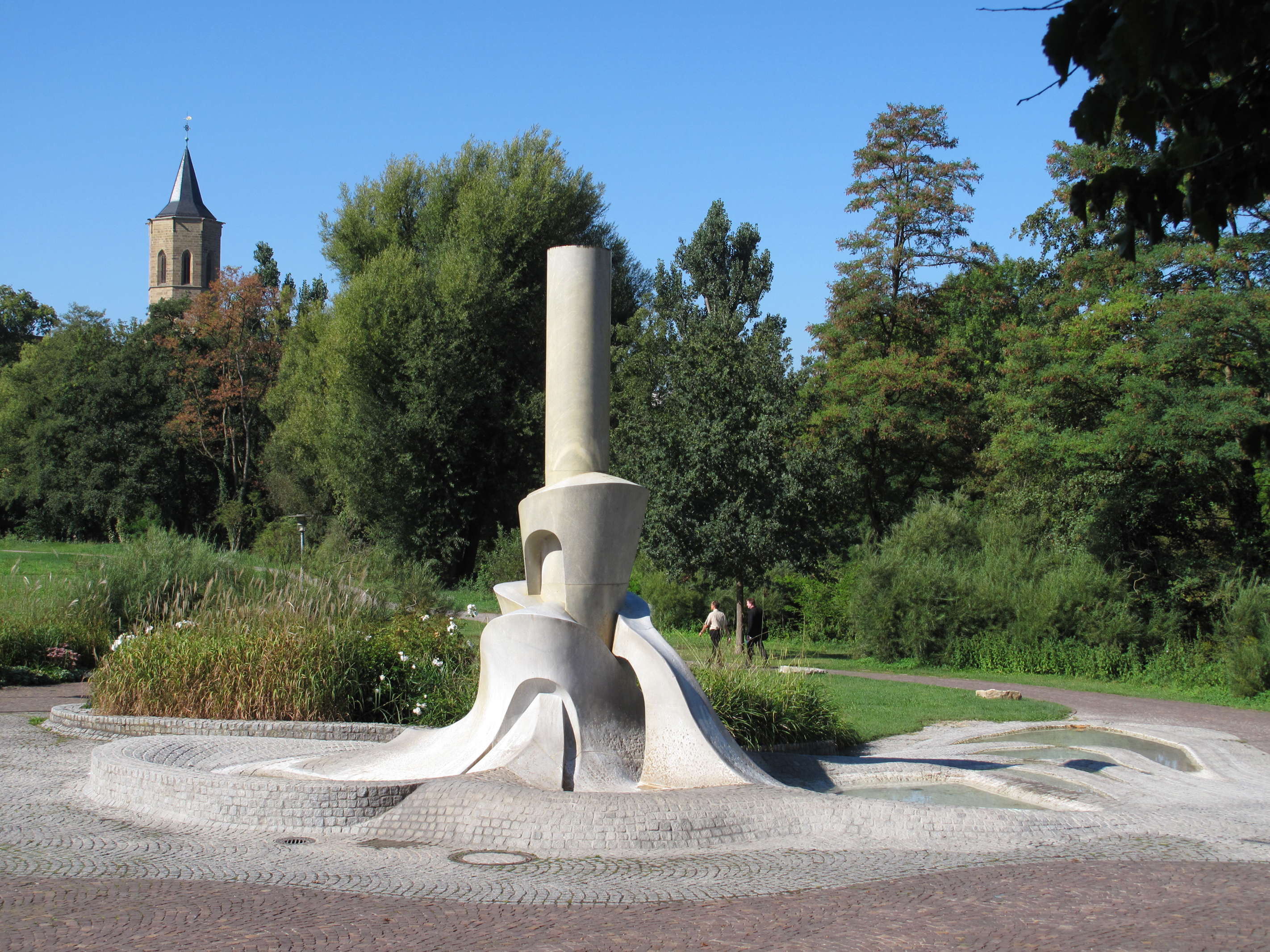 Hüseyin Altin, Brunnen, 1985, - Deutschland, Baden-Württemberg, Waiblingen, Bürgerzentrum Remsaue